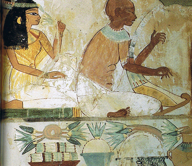 Blinder Musiker